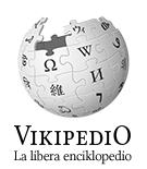 Wikipedia logo 2.0 (eo)